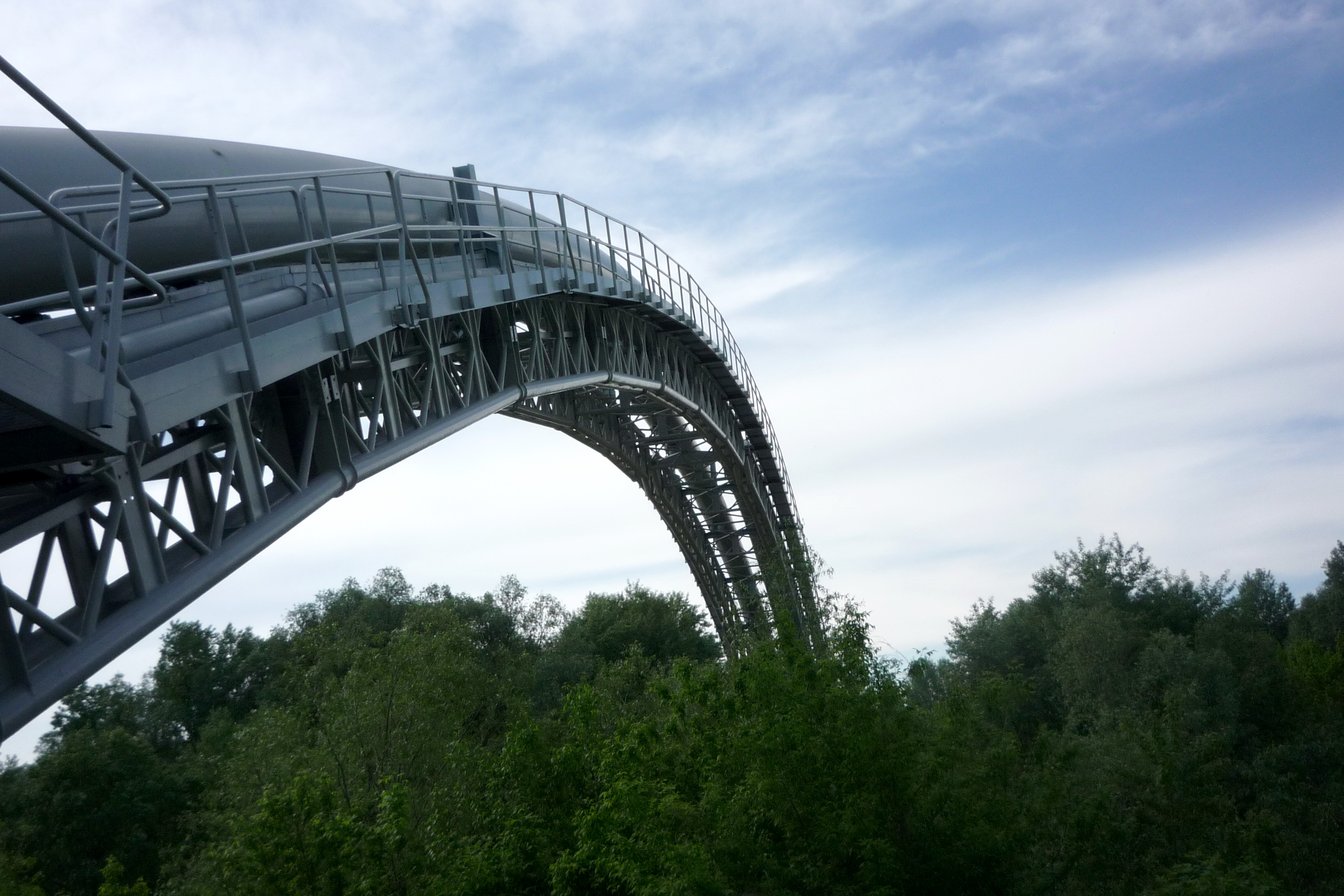 Gas pipeline